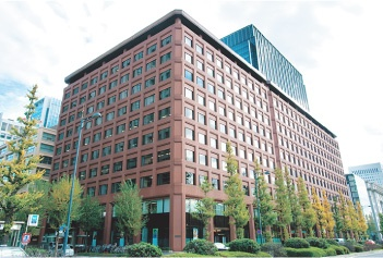 丸の内三井ビルディング